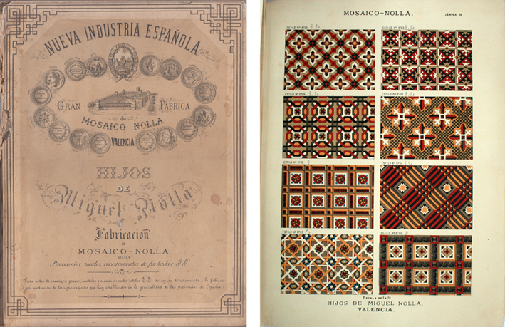 Portada e interior de un catálogo de la empresa de Hijos de Miguel Nolla